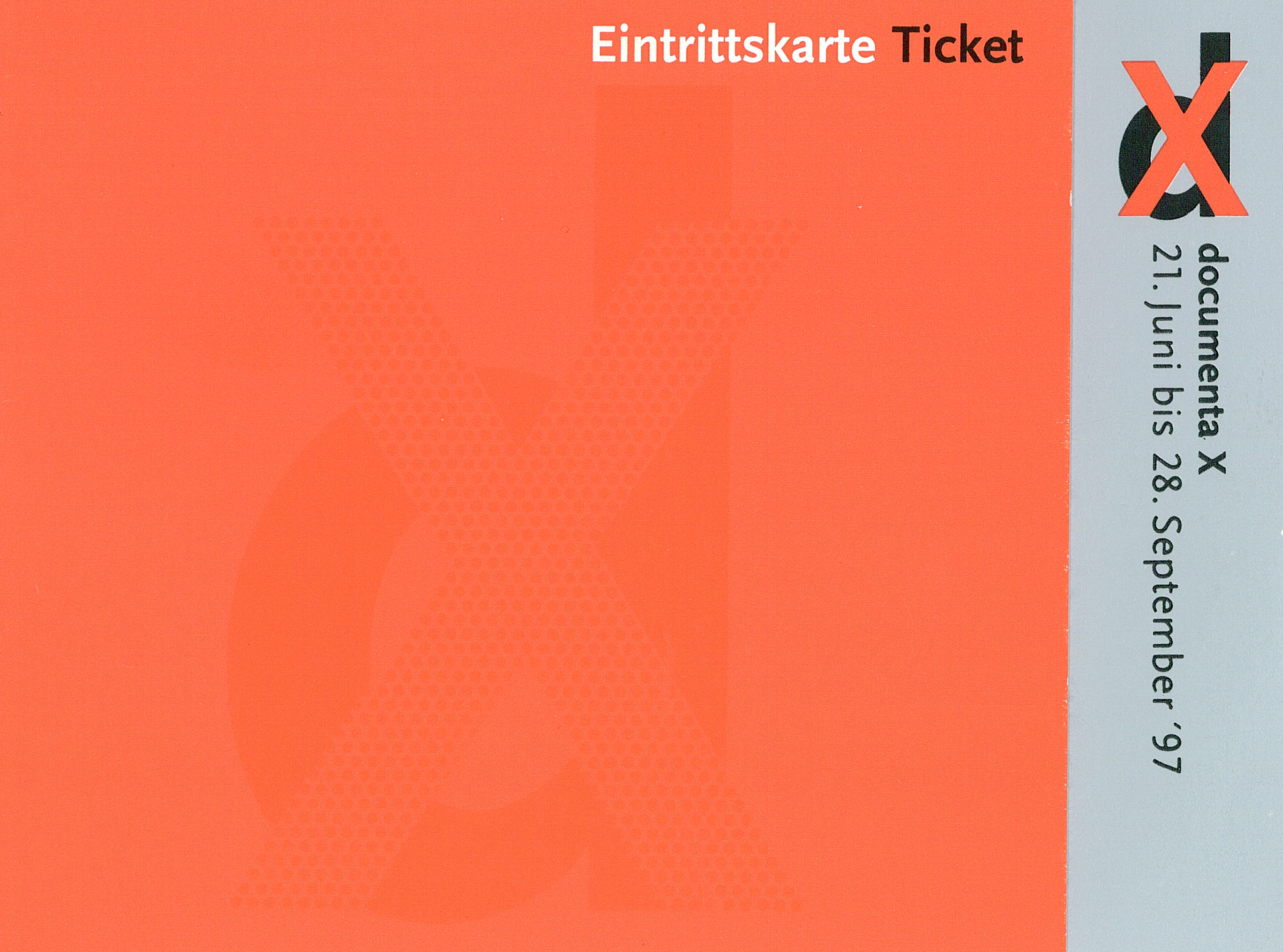 Foto des Tickets / Eintrittskarte der documenta X